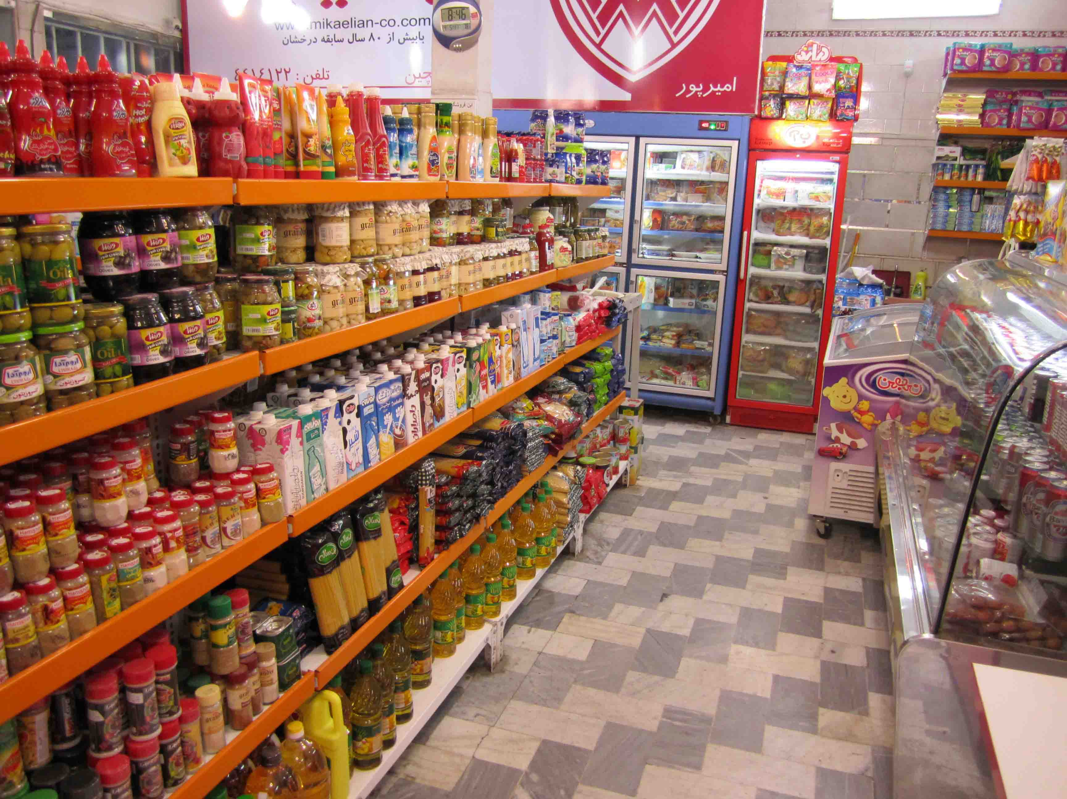 سوپرمارکت